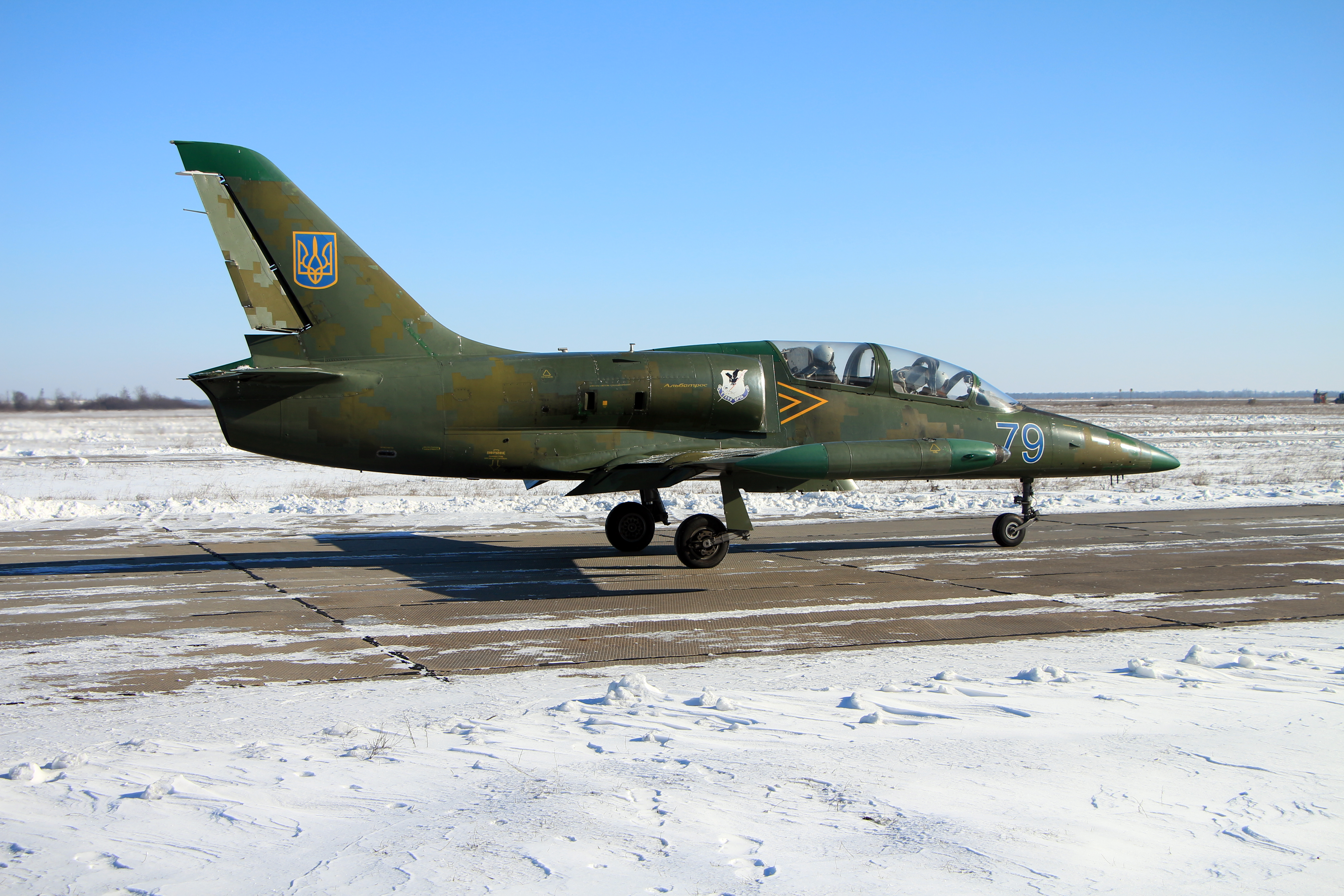 У бригаді тактичної авіації імені генерал-лейтенанта Василя Нікіфорова відбулися командирські польоти У Миколаєві, в бригаді тактичної авіації відбулися командирські польоти, якими у льотчиків прийнято відкривати новий навчальний рік. Незважаючи на погодні умови, злітно-посадкова смуга аеродрому була розчищена від криги та снігових заметів, тож все було готово до чергової льотної зміни, під час якої штурмовики підтверджували свою кваліфікацію. Першим у небо здійнявся командир авіаз’єднання. Протягом льотної зміни кожен льотчик бригади здійснив два-чотири вильоти. Літали як поодинці, так і у складі пар. Окрім досвідчених льотчиків у цей день відпрацьовували навички з пілотування і молоді. Цього дня на аеродромі бригади “кипіла” напружена робота. Поки штурмовики кружляли в повітрі, відпрацьовуючи польотні завдання, фахівці і спеціалісти наземних служб дозаправляли пальним, прогрівали двигуни, обслуговували авіаційну техніку. Робота на землі “вирувала” так само безперервно, як і у небі. Тиша на аеродромі цього дня настала лише, коли сонце сховалось за обрій.